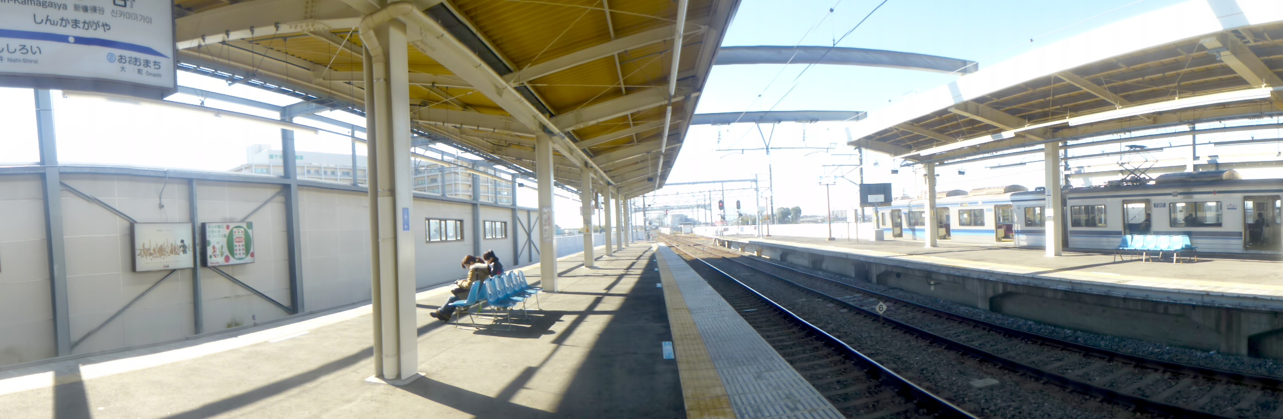 新鎌ヶ谷駅のホーム (Shin-Kamagaya Station platforms)